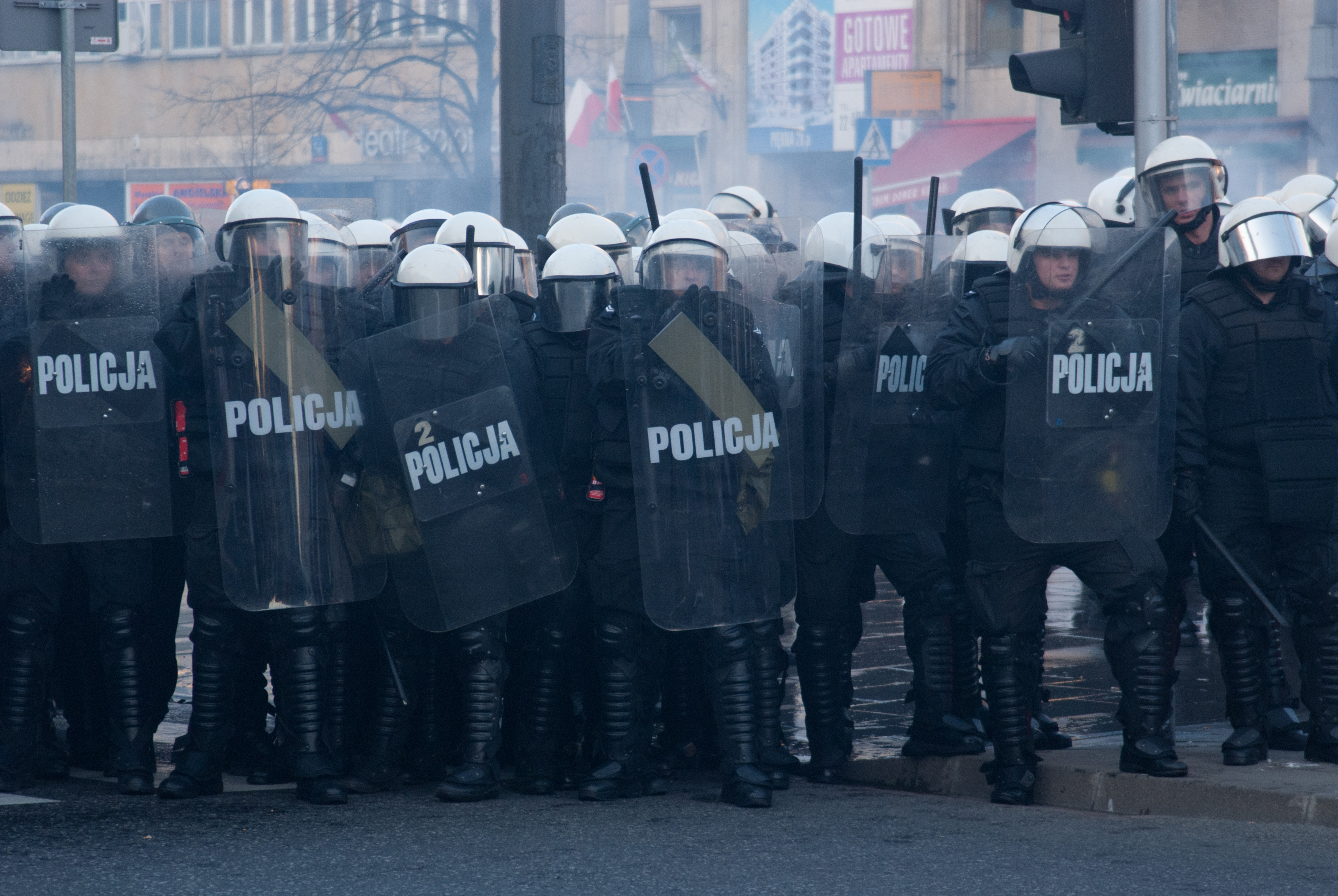 Warszawa, Marsz Niepodległości 2011, Plac Konstytucji